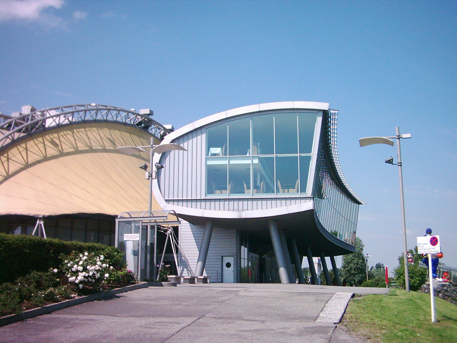 Theater im Hafen, Hamburg-Steinwerder. Blick auf den angegliederten Restaurationsbereich.